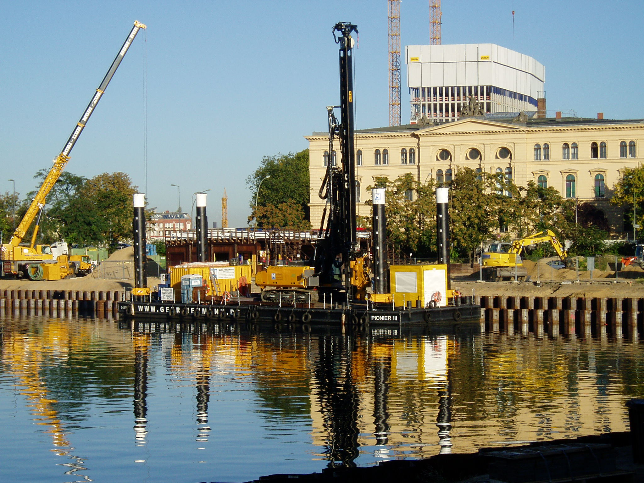 Berlin-Mitte, Humboldthafen: Sanierung der Kaimauern